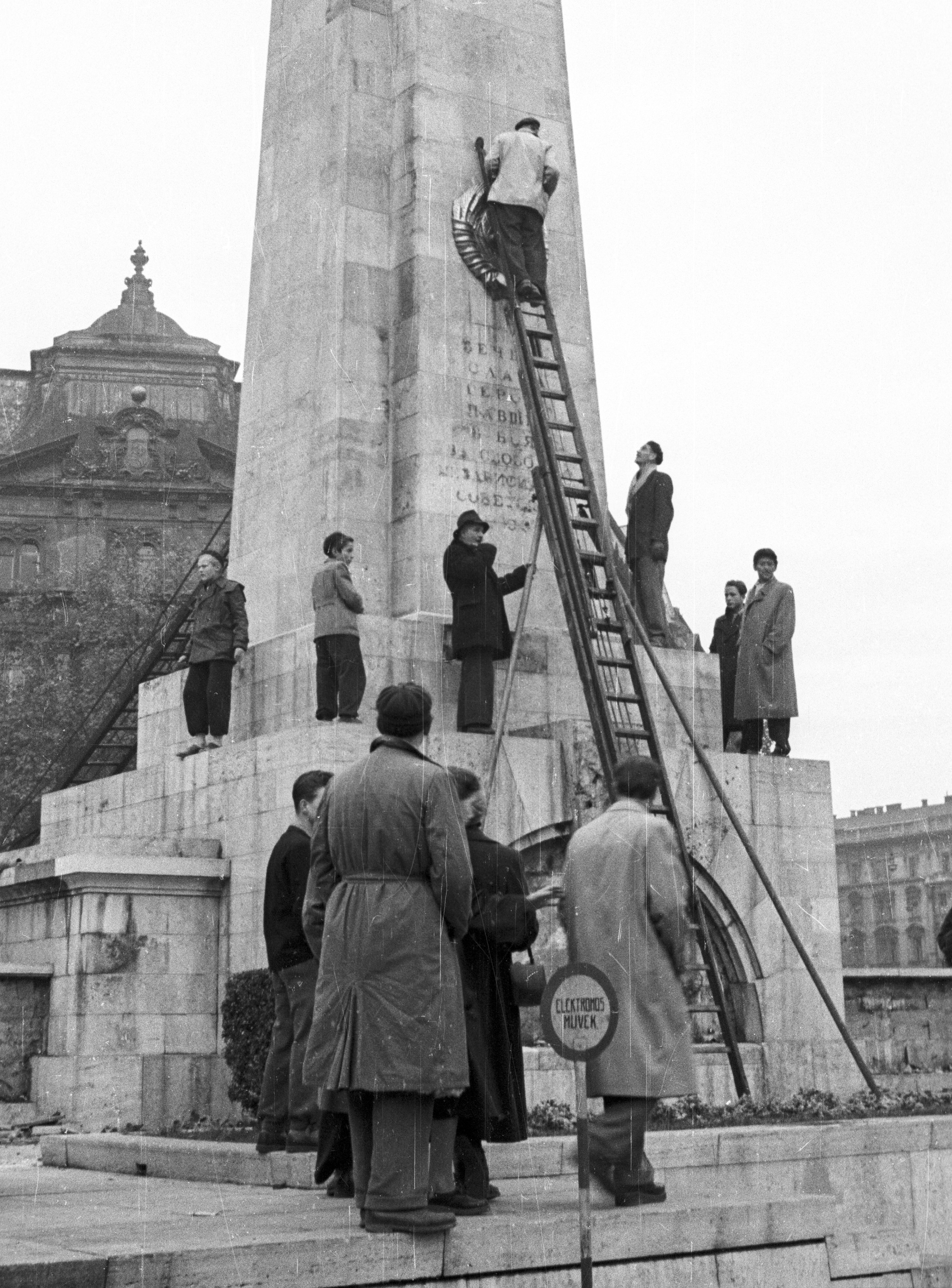 Szabadság tér, szovjet hősi emlékmű, jelképek eltávolítása. Location: Hungary, Budapest V. Tags: crest, ladder, road sign, Soviet memorial, destruction of symbols, Budapest, revolution Title: Szabadság tér, szovjet hősi emlékmű, jelképek eltávolítása.